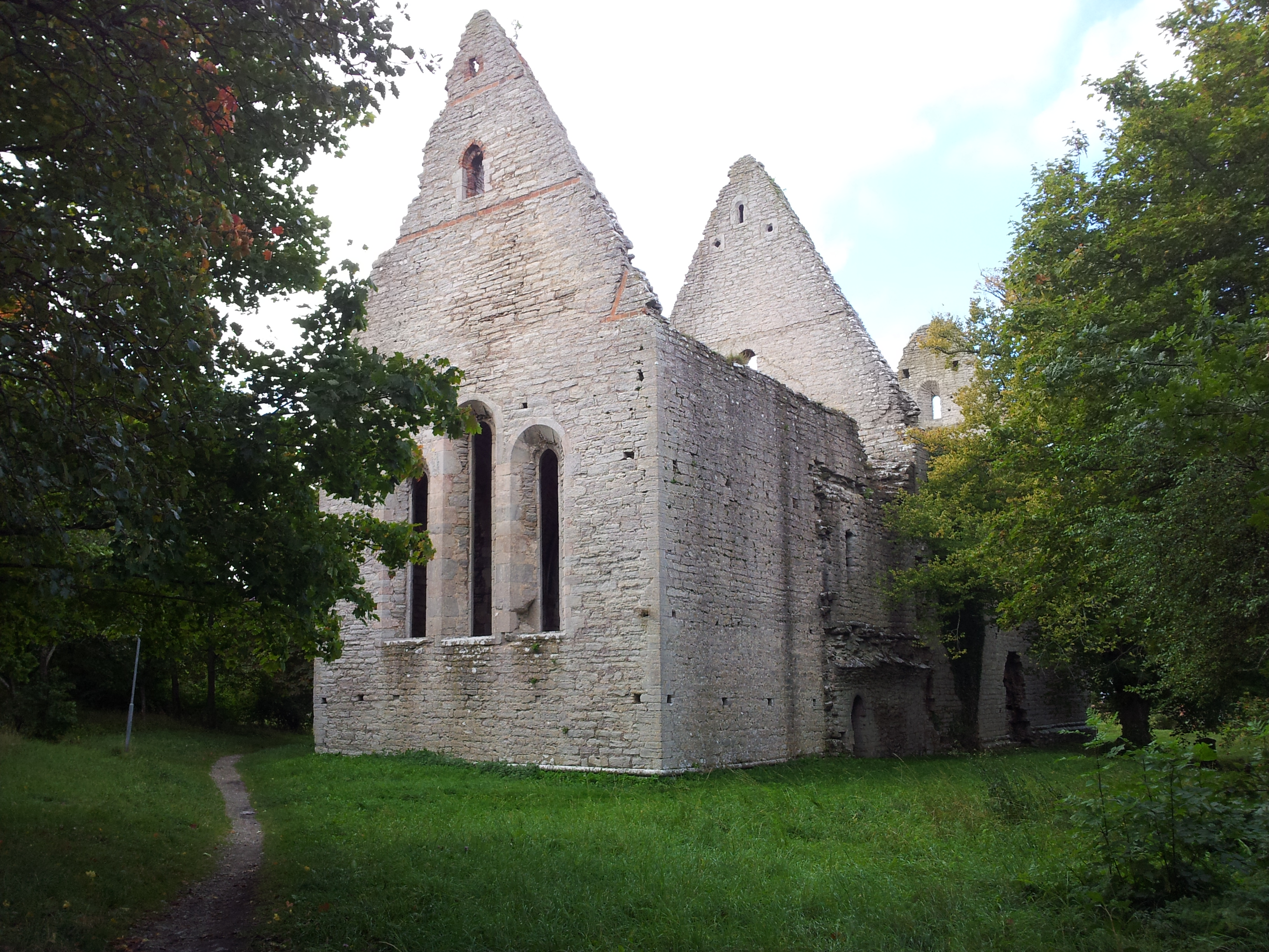 S:t Görans ruin